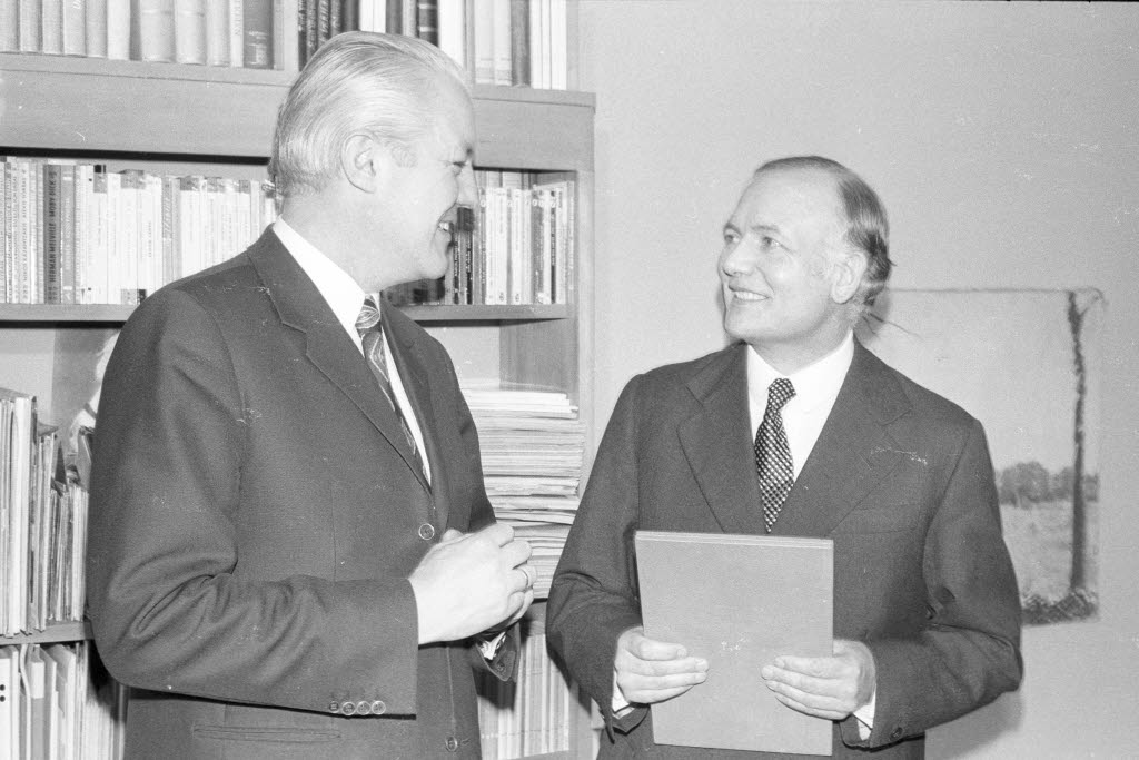 Der auf Gut Seekamp lebende Künstler nimmt den Preis in seinem Atelier von Ministerpräsident Gerhard Stoltenberg (links) entgegen.